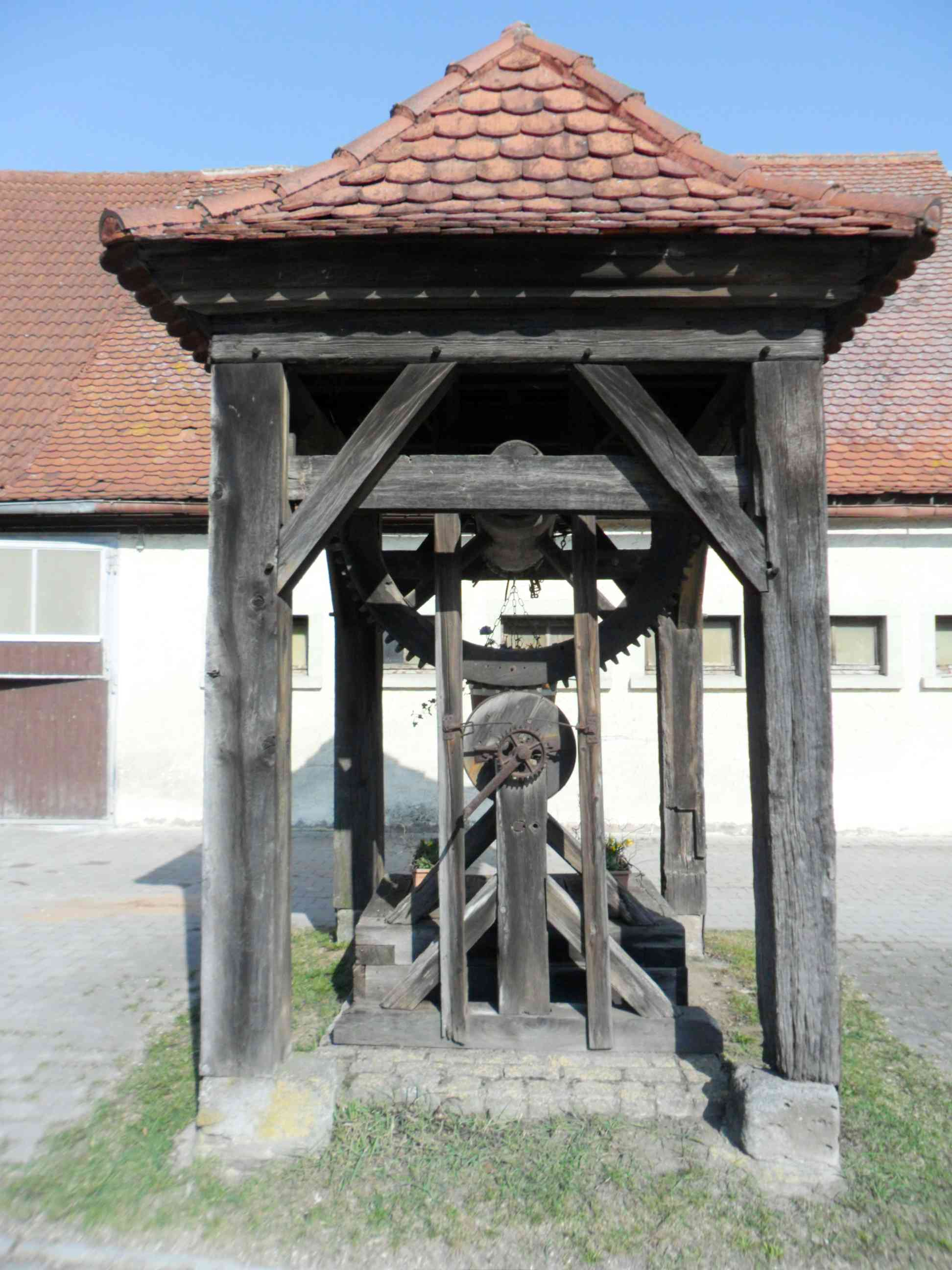 Auerbach (Colmberg) (Kreis Ansbach; Bayern)